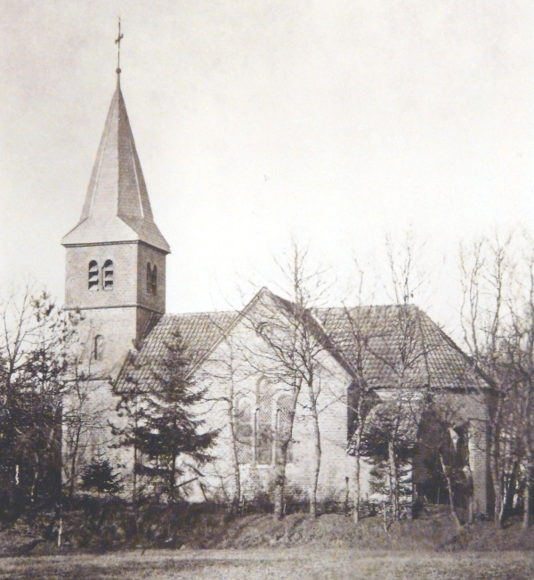 Lüsche (Bakum), kath. Kirche St. Josef, Erscheinungsbild 1878